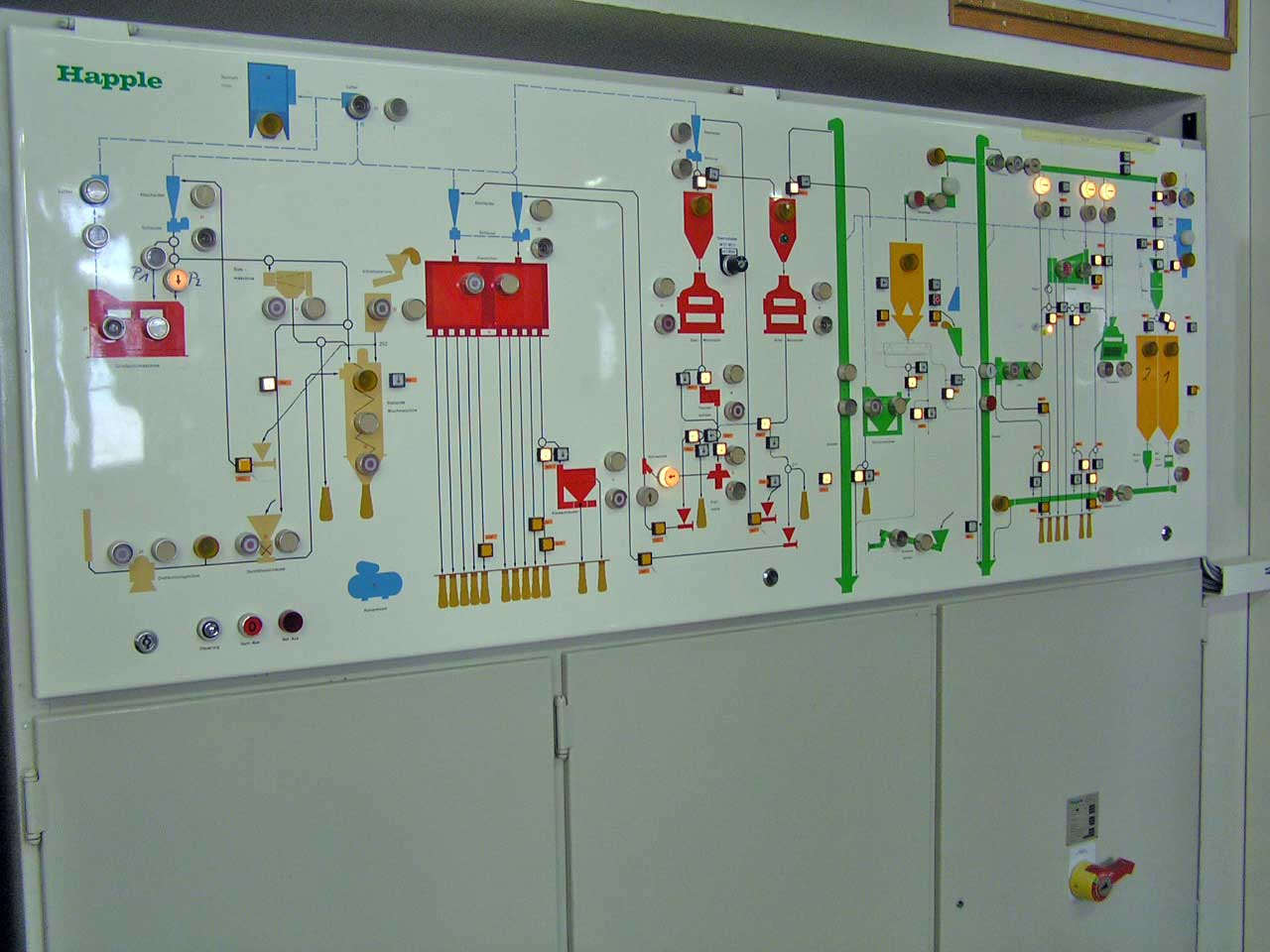 Beschreibung: Schaltschrank einer Mühle Fotograf: Benutzer:BMK 2004 Please send reference and voucher copy to BMK(at)clever.ms Bitte Quellenangabe und Beleg an BMK(at)clever.ms